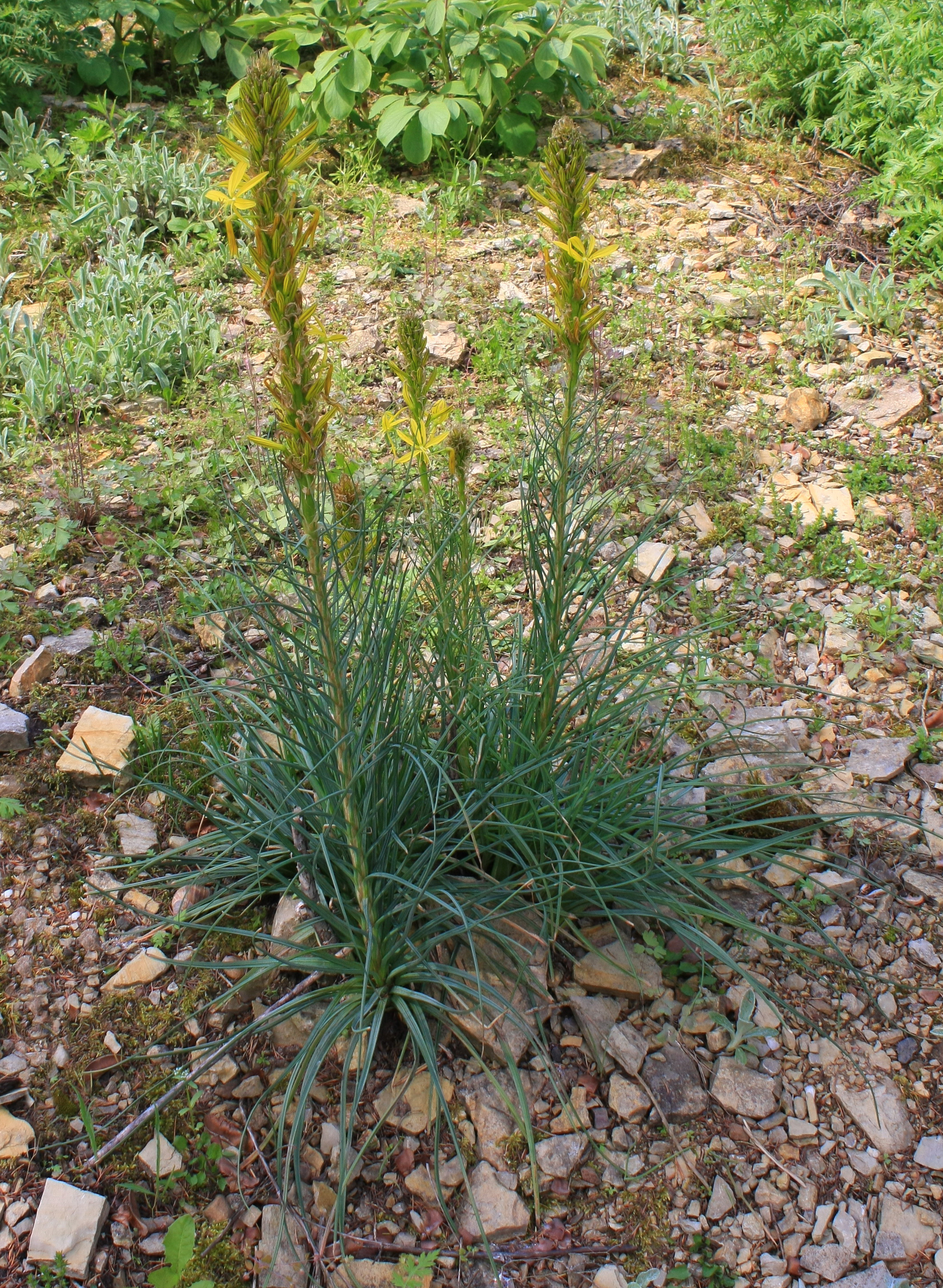 Unidentified Liliopsida